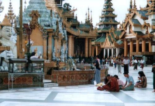 Schwedagon Pagoda in Rangoon, Myanmar